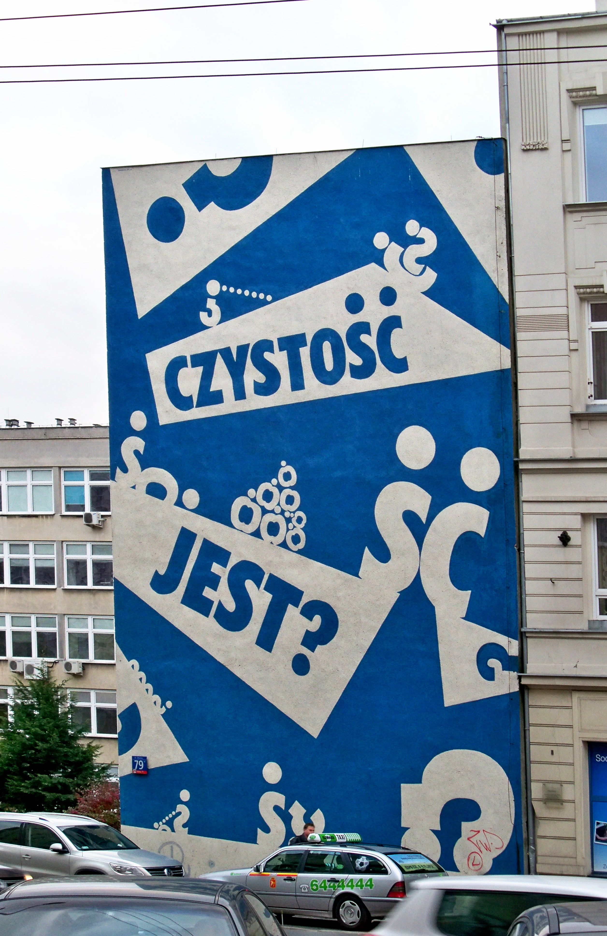 Czystość jest? Mural grupy Twożywo (2008) na WSSE przy Żelaznej 79 w Warszawie